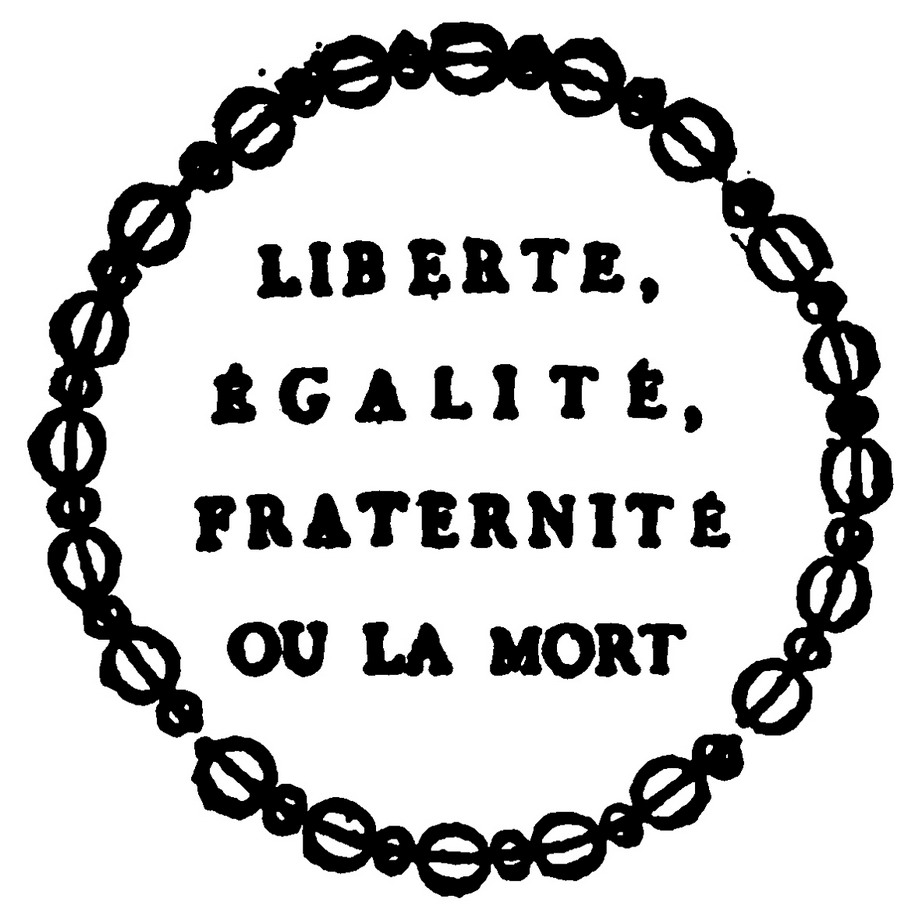 Devise révolutionnaire de France apposée sur tous les monuments parisiens annexés par la nation